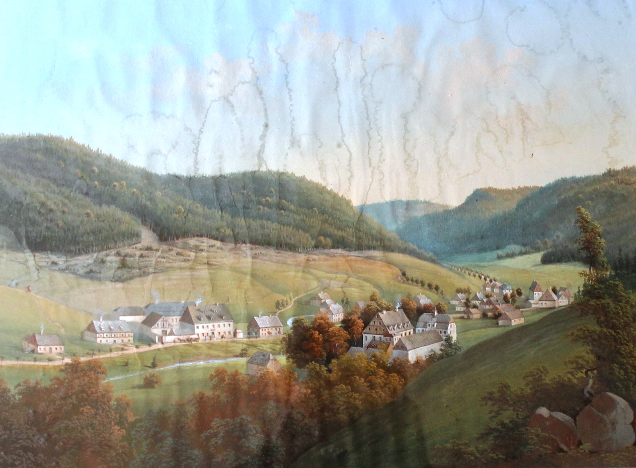 Aquarell, Wildenthal im sächsischen Erzgebirge um 1830, Blick nach Süden zum Hirschenstander Pass nach Böhmen, im Vordergrund das Hammerherrenhaus